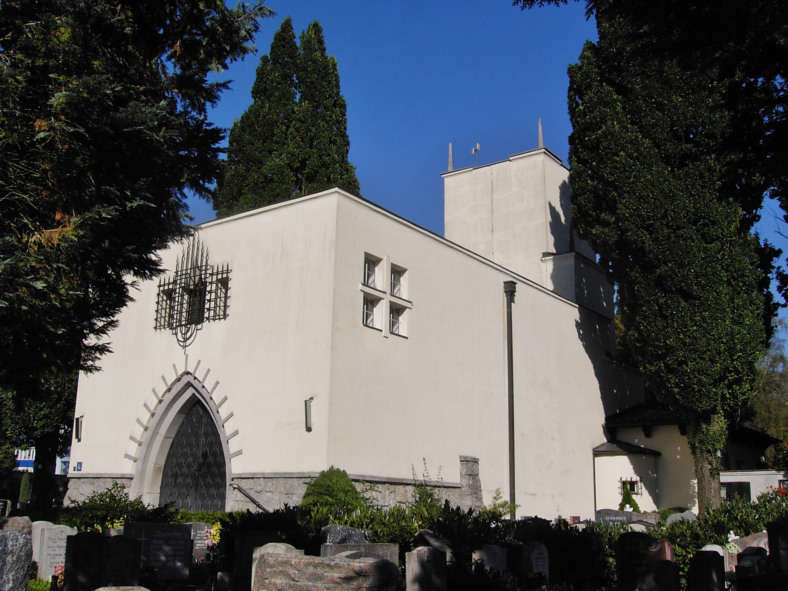 Steyr Taborweg 8, Krematorium, Südwestansicht